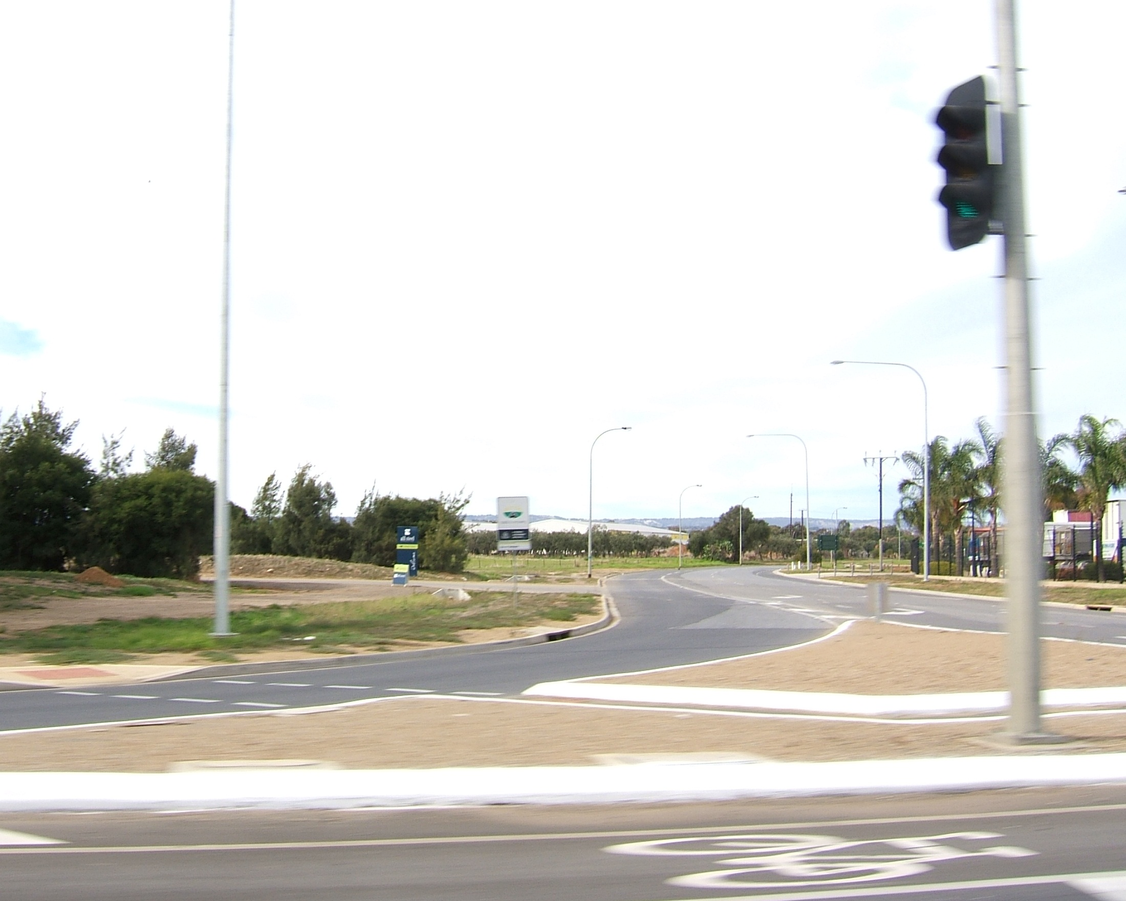 Ryans Rd, Adelaide